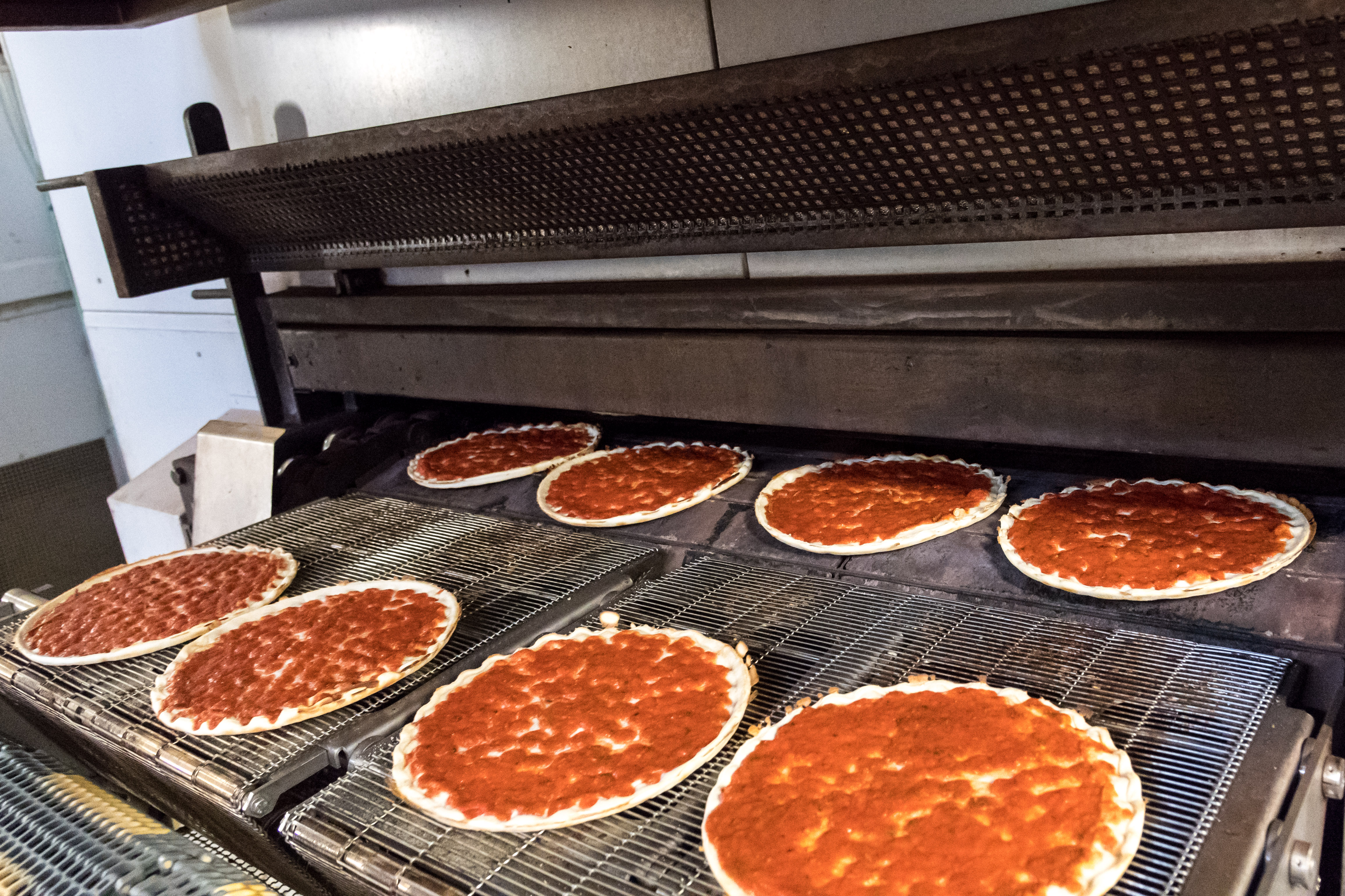 Original Wagner Steinofen Pizza wird mit Sauce vorgebacken